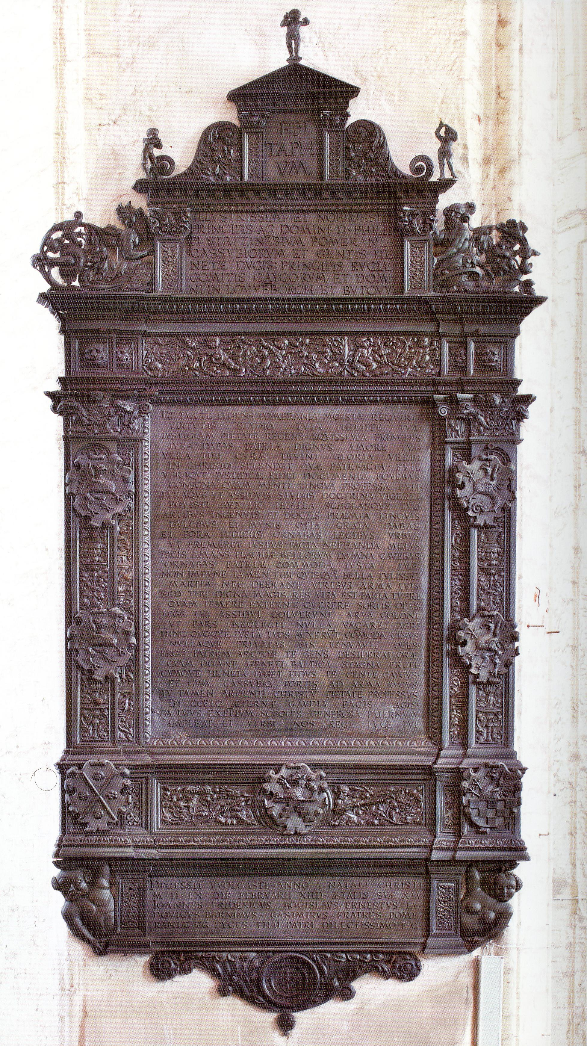 Herzoglicher Wappenepitaph in der Petri-Kirche Wolgast